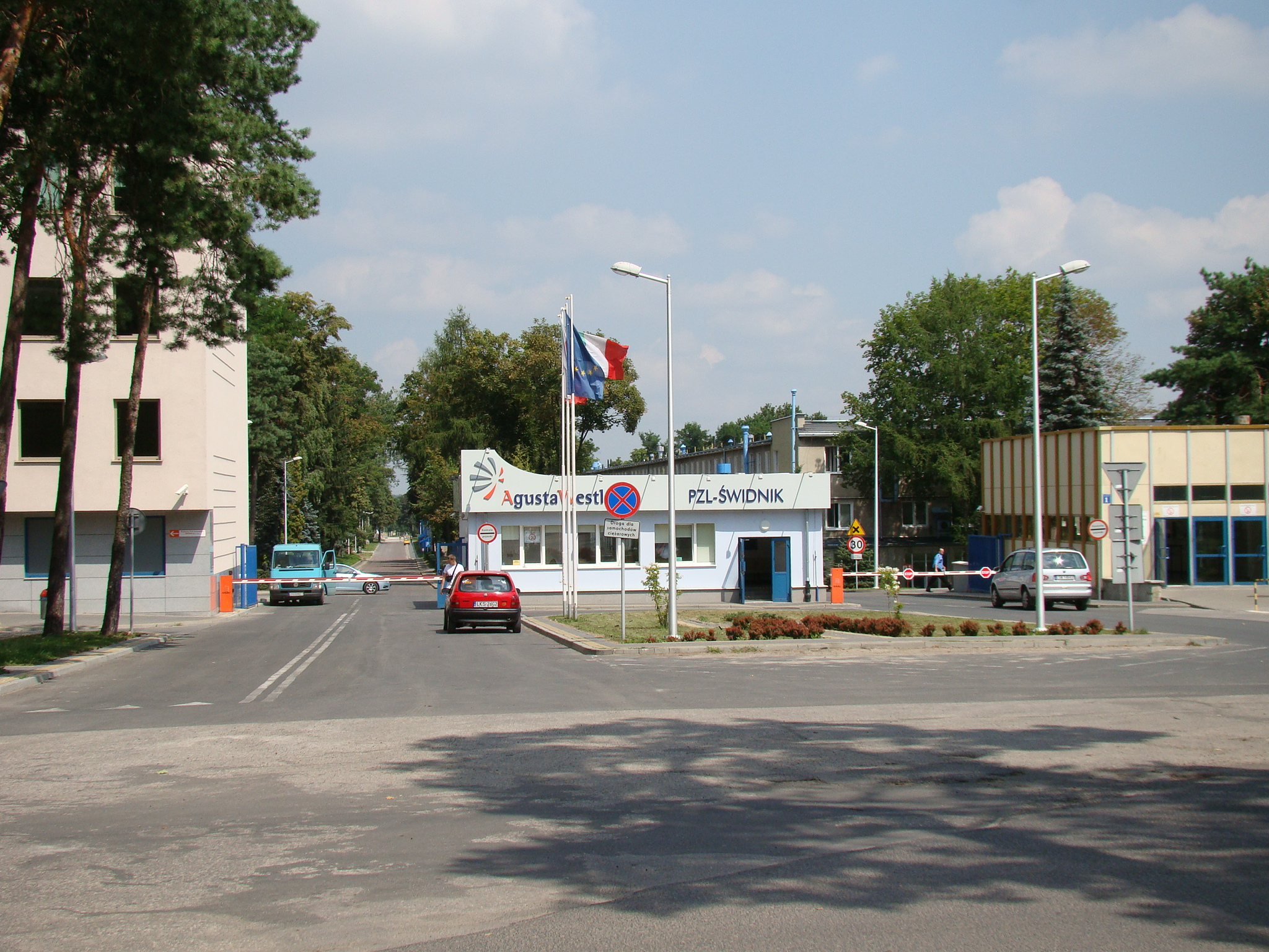 Brama główna zakładu PZL Świdnik